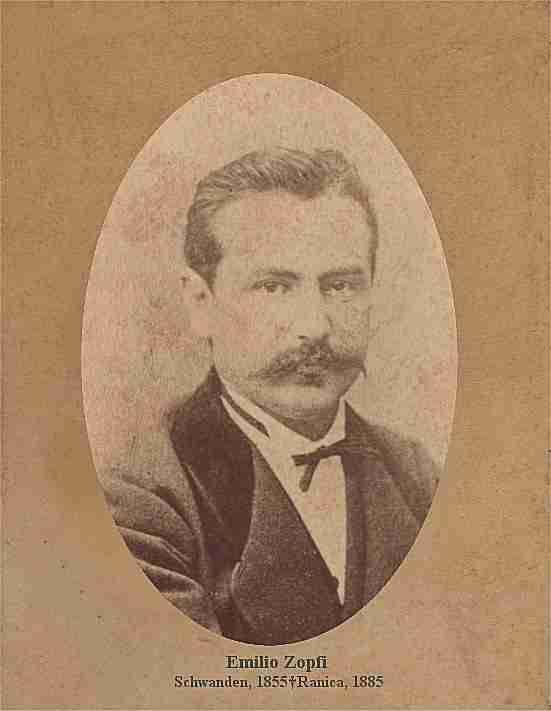 Emilio Zopfi (1855-1885) figlio di Gioachino e di Anna Maria Aebli